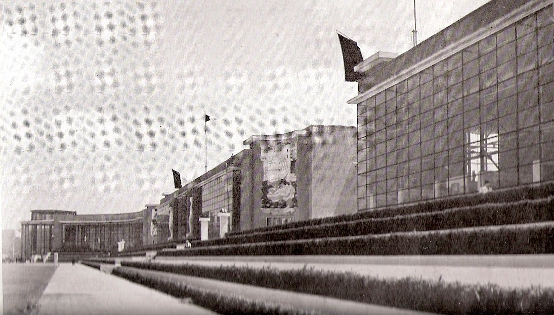 L'enfilade du palais de la France et des gradins d'où la foule assiste aux fêtes données sur l'esplanade lors de l'Exposition internationale de Liège en 1939.